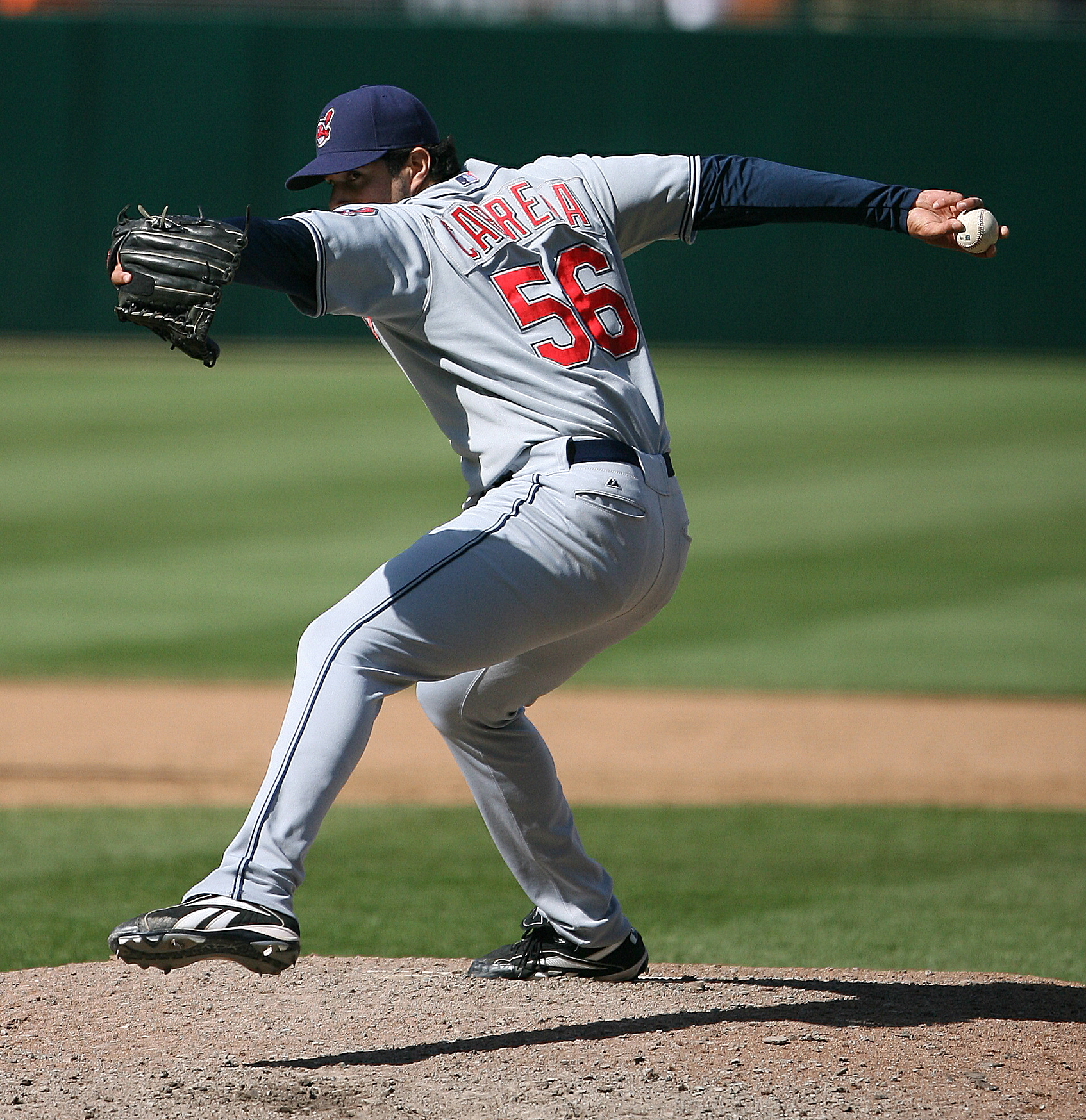 Fernando Cabrera